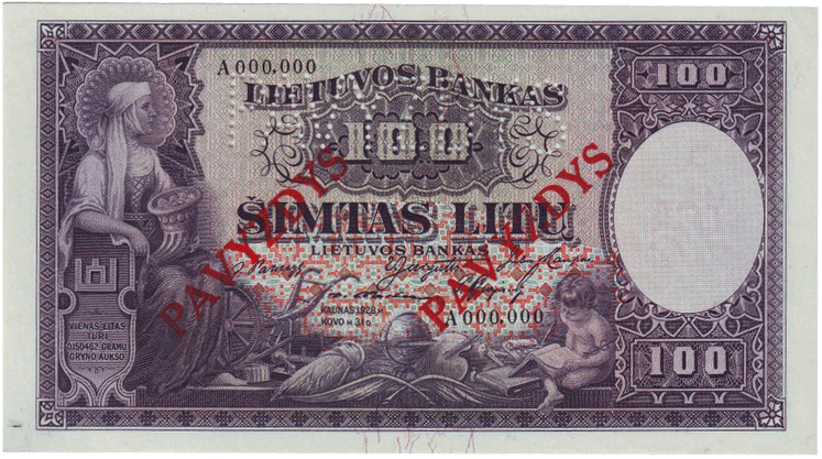 100 litas specimen (1928)